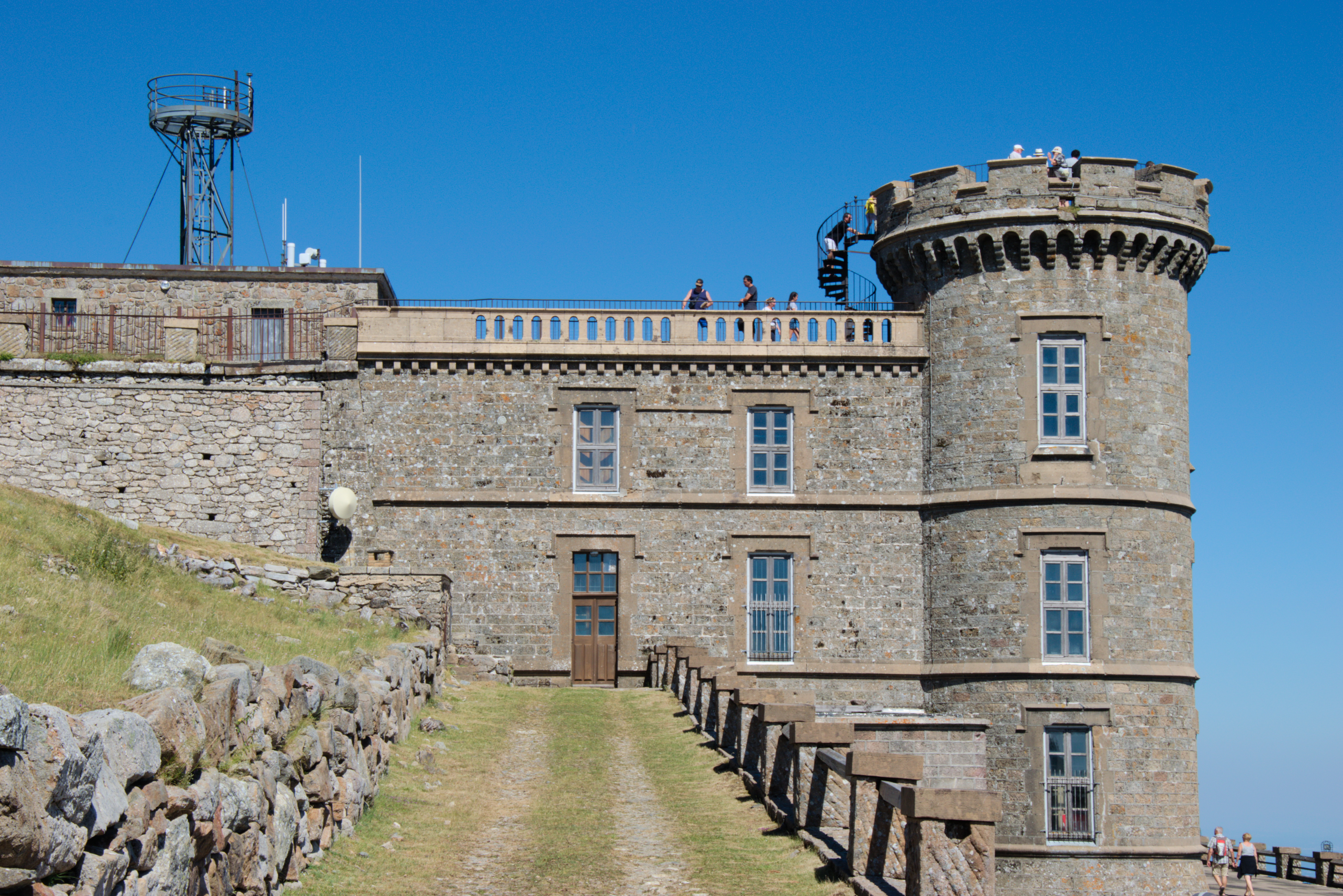 L'observatoire Météo-France du Mont Aigoual. A ce jour c'est la dernière station météo de montagne habitée en France.